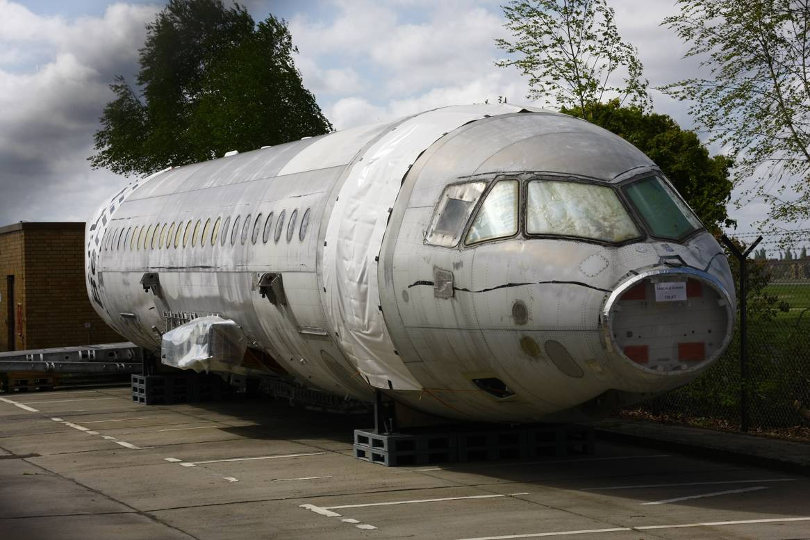 Rumpf der Dornier Do 728 (wohl TAC 73)